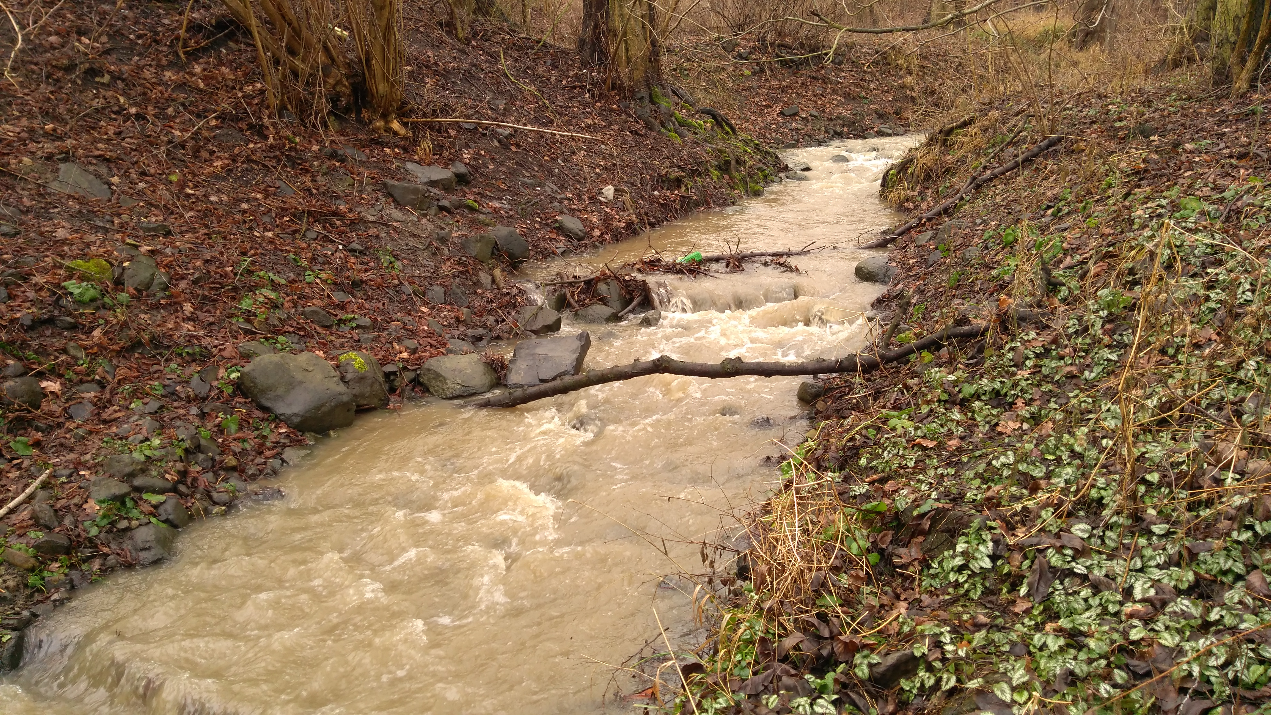 Potok.